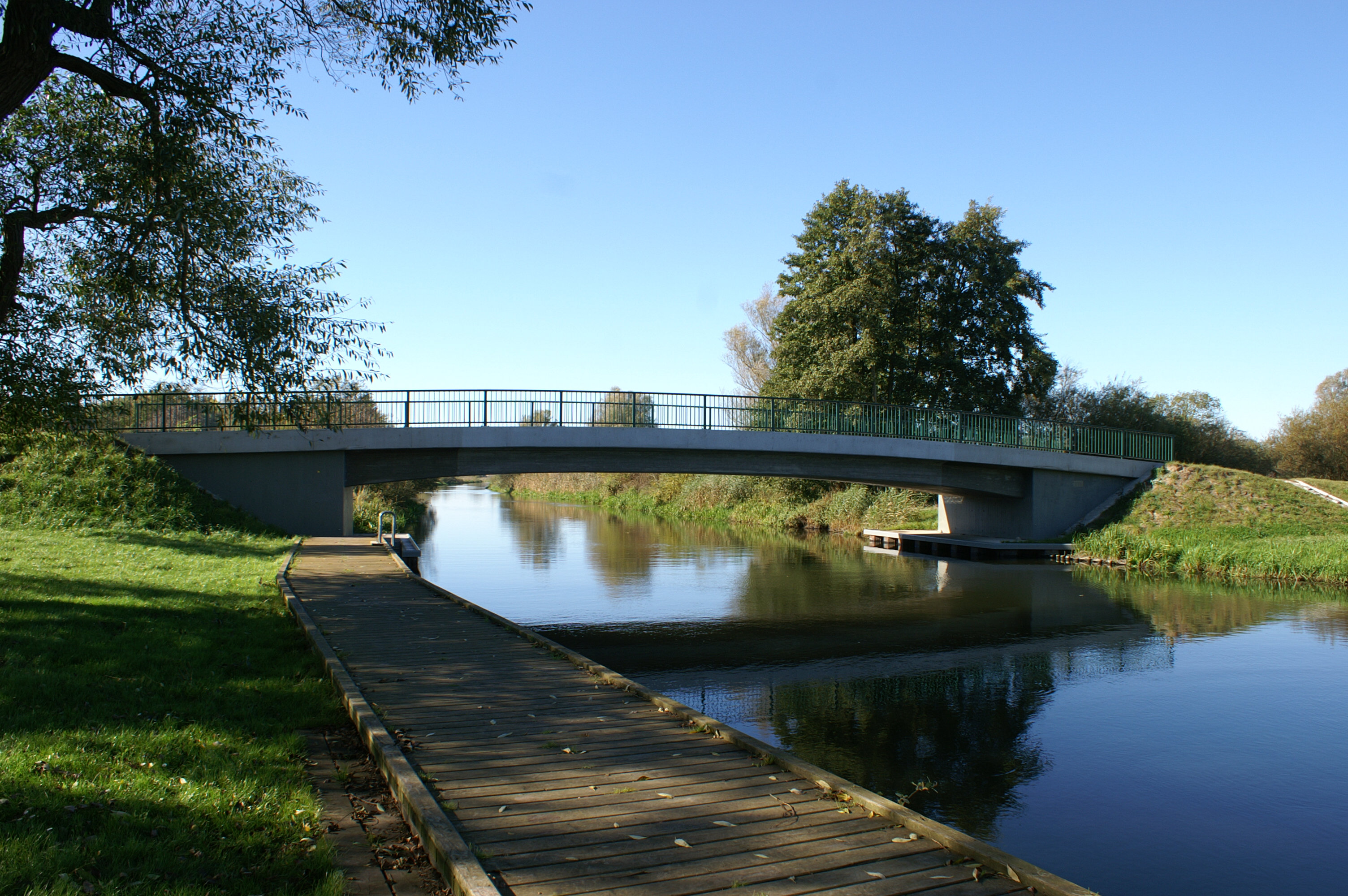 Tollensebrücke bei Sanzkow (Landkreis Demmin)